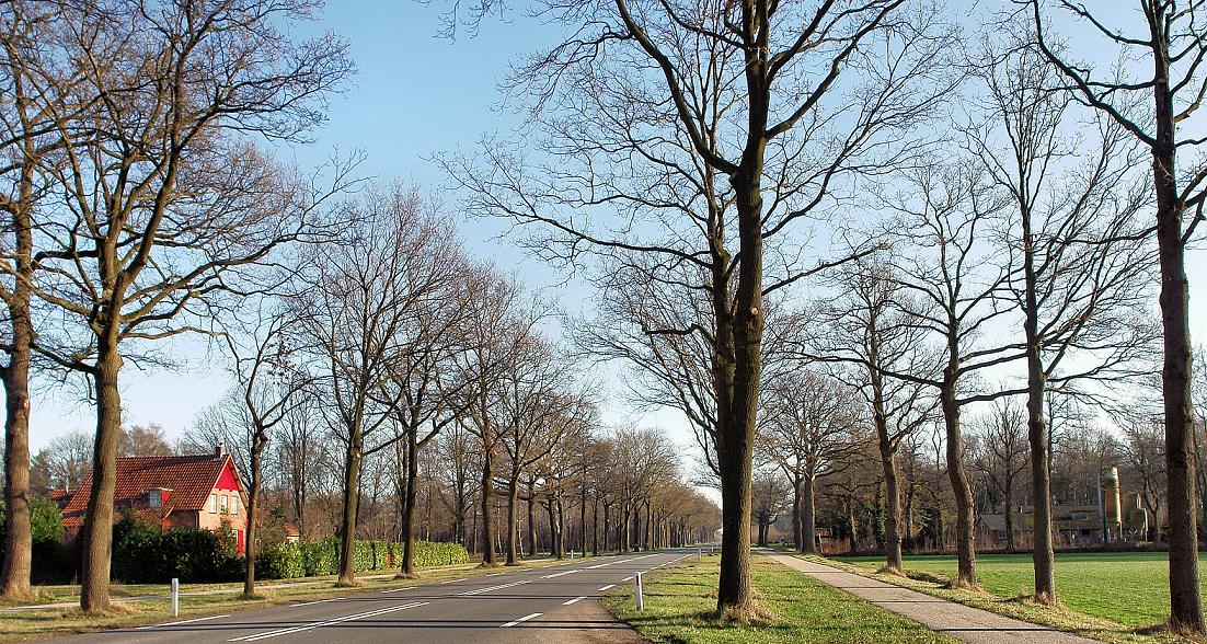 Eikenlaan Lintelo